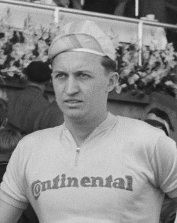 Start Ronde van Nederland Stadion Utrecht . Duitse ploeg (Continental) kopman Gunter Pankoke